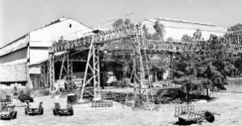 Renuka sugar karkhana balajinagar